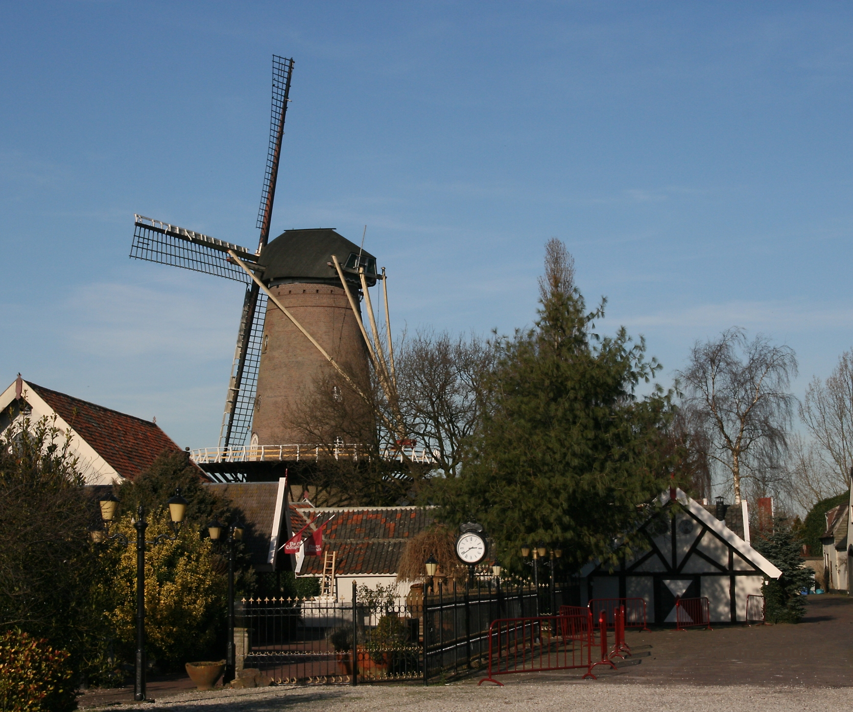 Kaatsheuvel: Molen De Eendragt